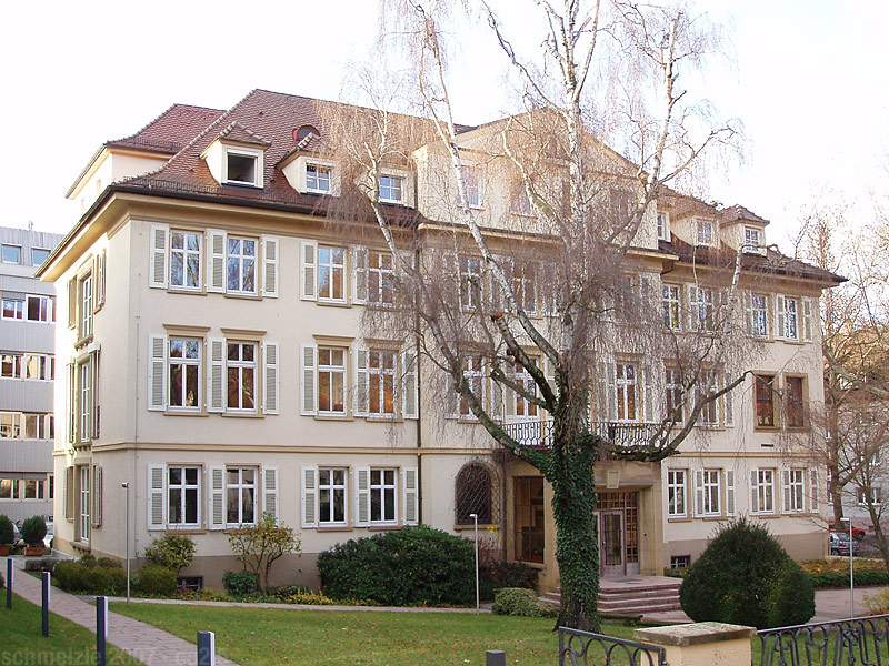 Denkmalgeschütztes Bankgebäude Karlstr. 72 in Heilbronn